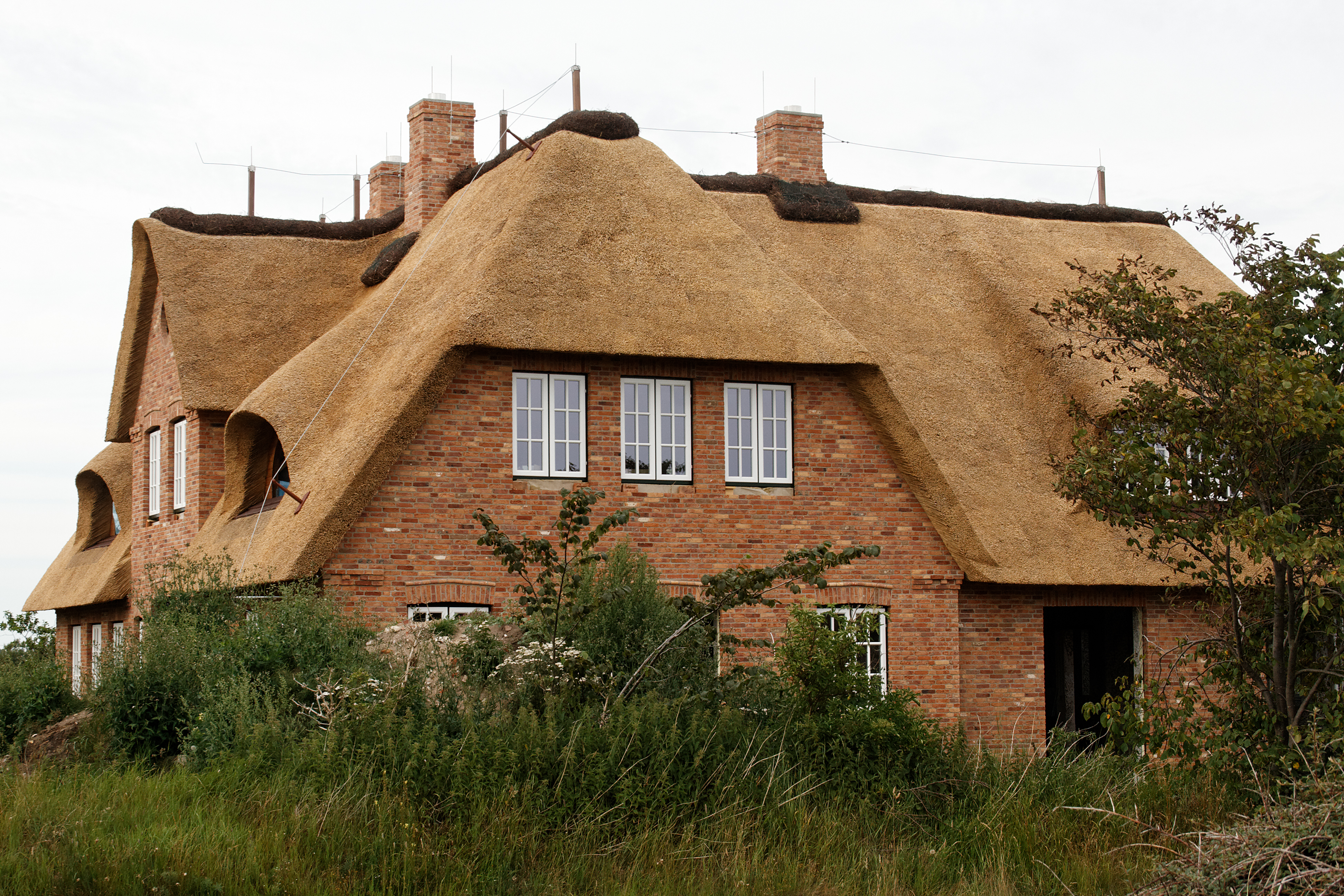 Neu gebautes Friesenhaus in Utersum, Insel Föhr.